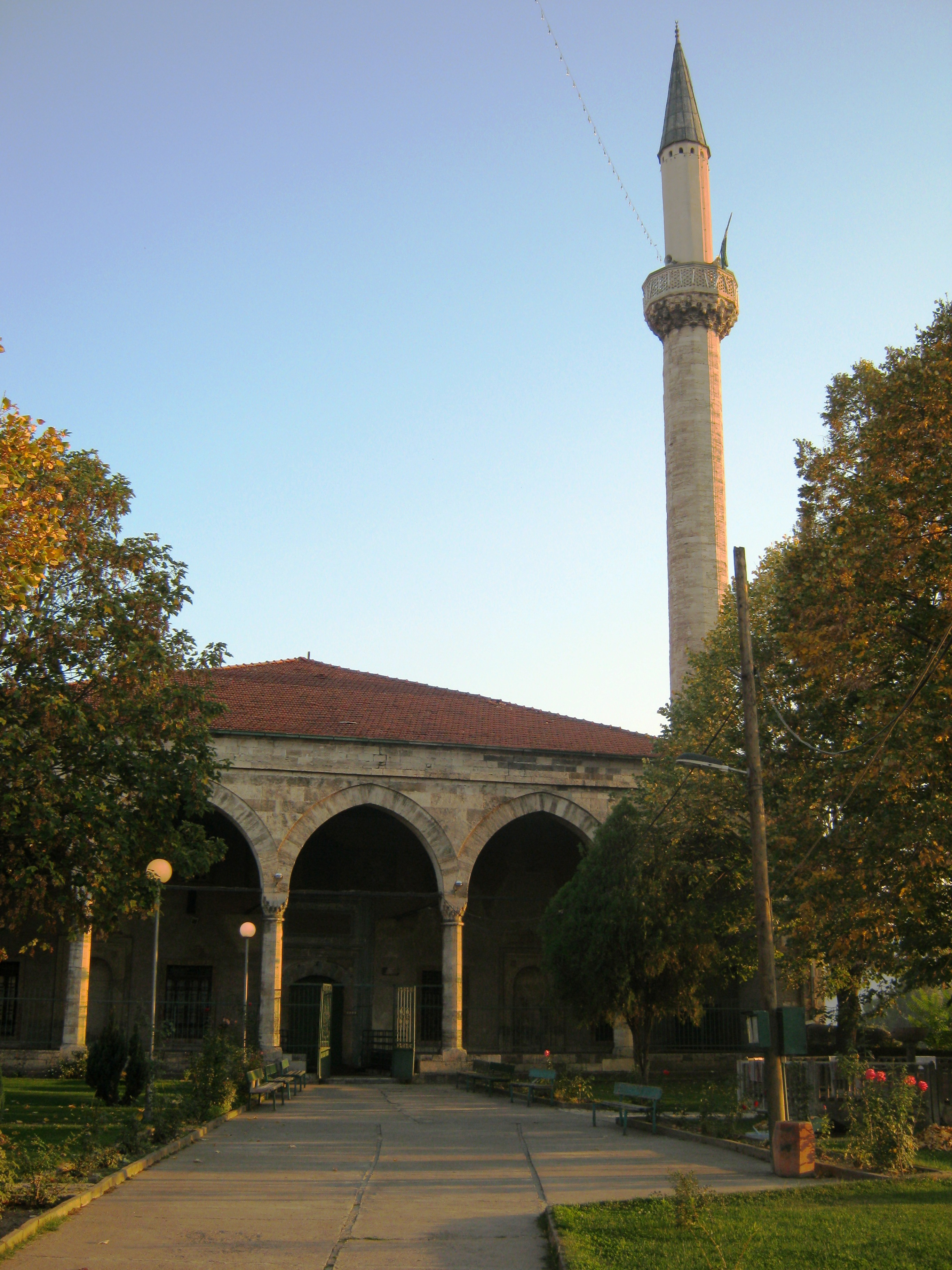 Поглед на Султан-муратовата џамија од нејзиниот двор